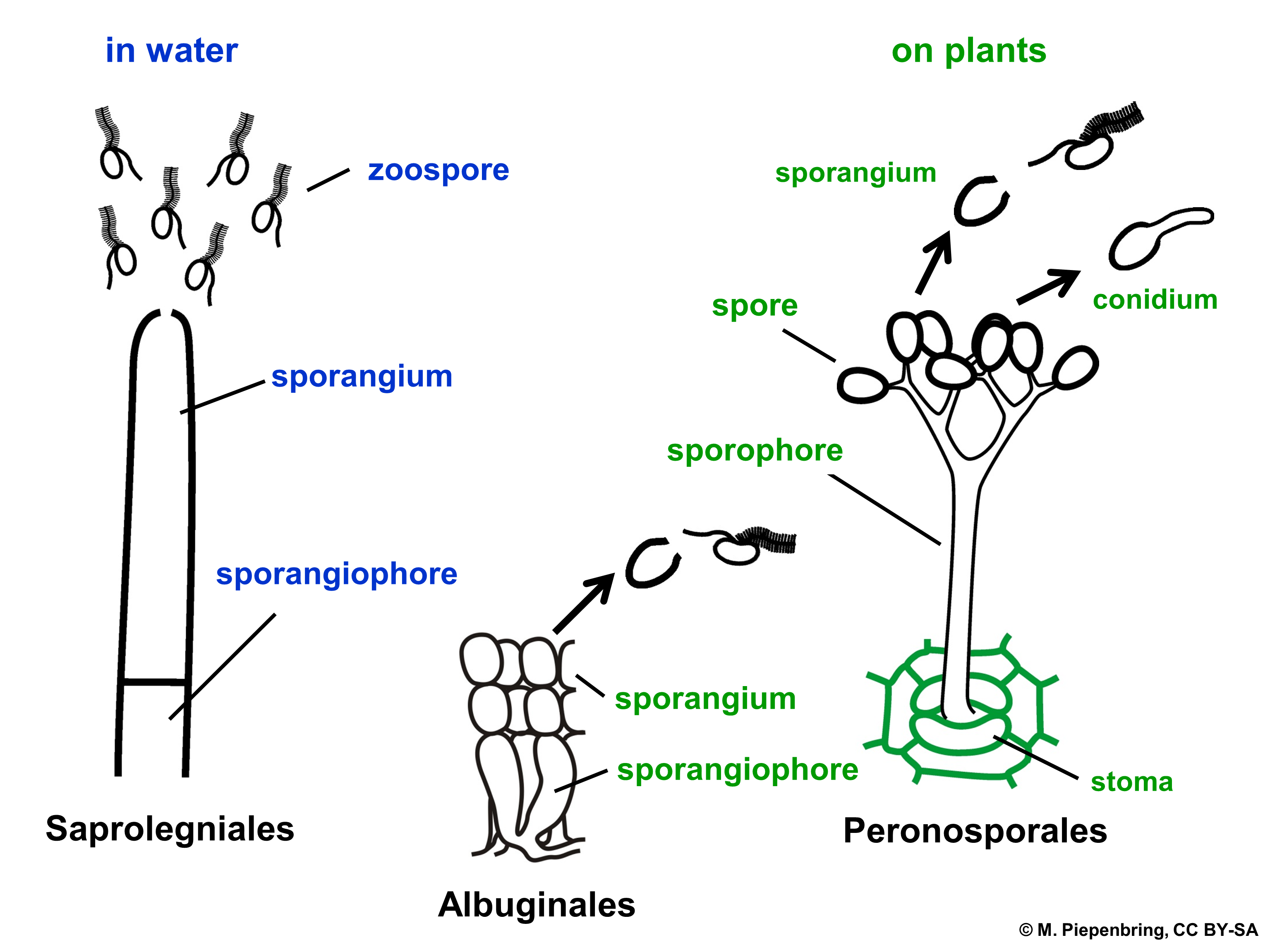 Biologische Schemata, gezeichnet und freigegeben von M. Piepenbring